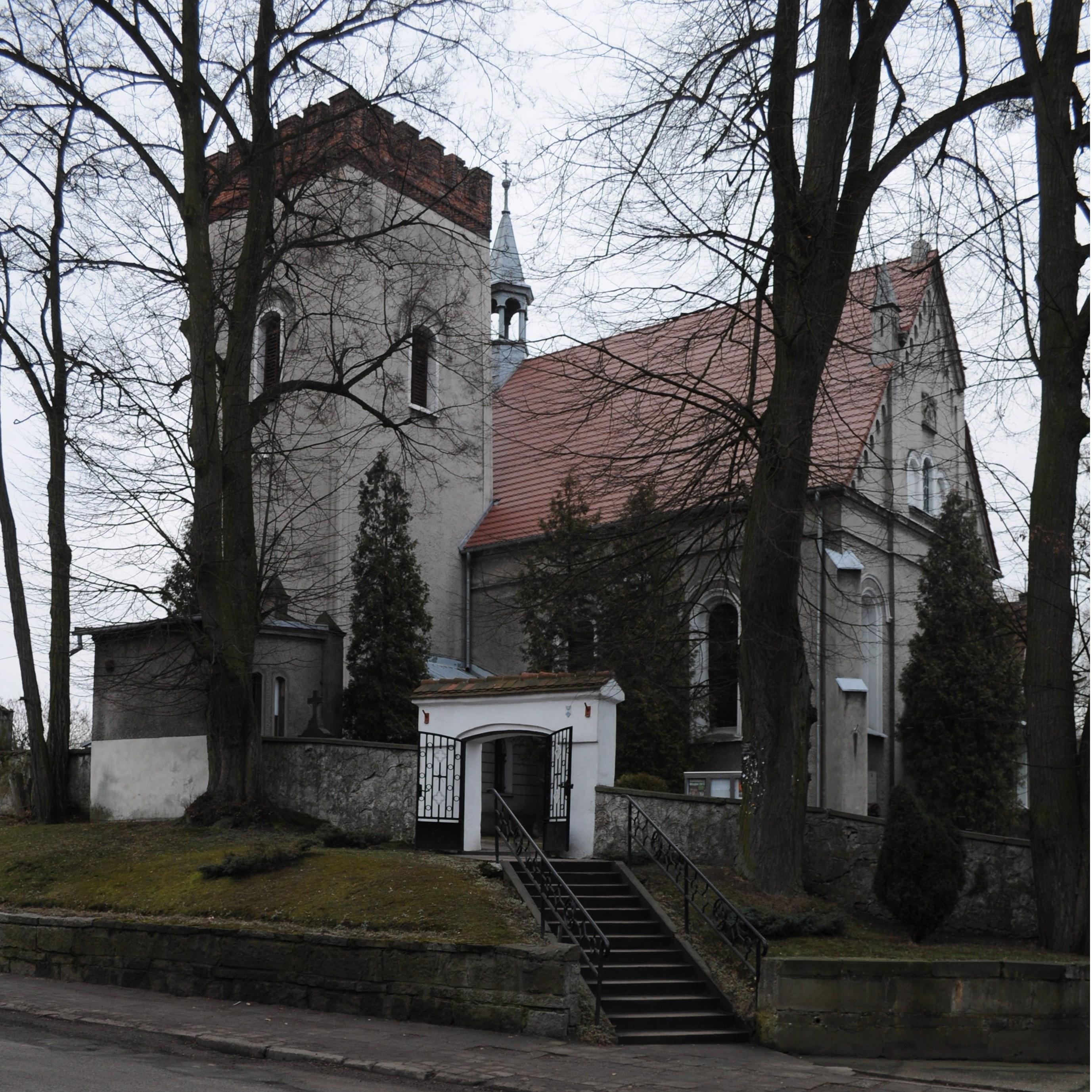 Kościół Narodzenia św Jana Chrzciciela w Kamieńcu.